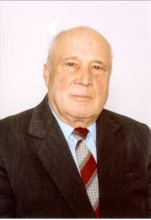 Каліман Павло Авксентiйович — академік АН вищої школи України